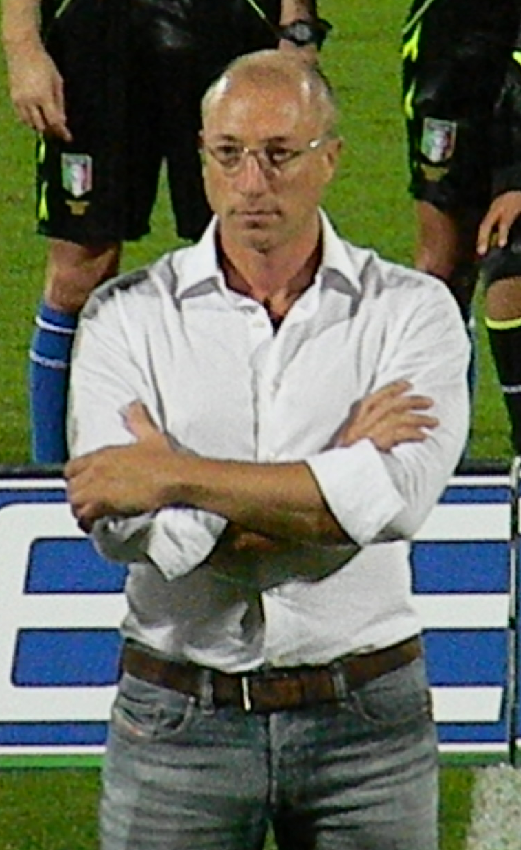 Il presidente dell'Associazione Sportiva Varese 1910 e patron di "Oro in Euro" Nicola Laurenza allo stadio di Varese il 31 agosto 2013, in occasione del match casalingo col Modena.